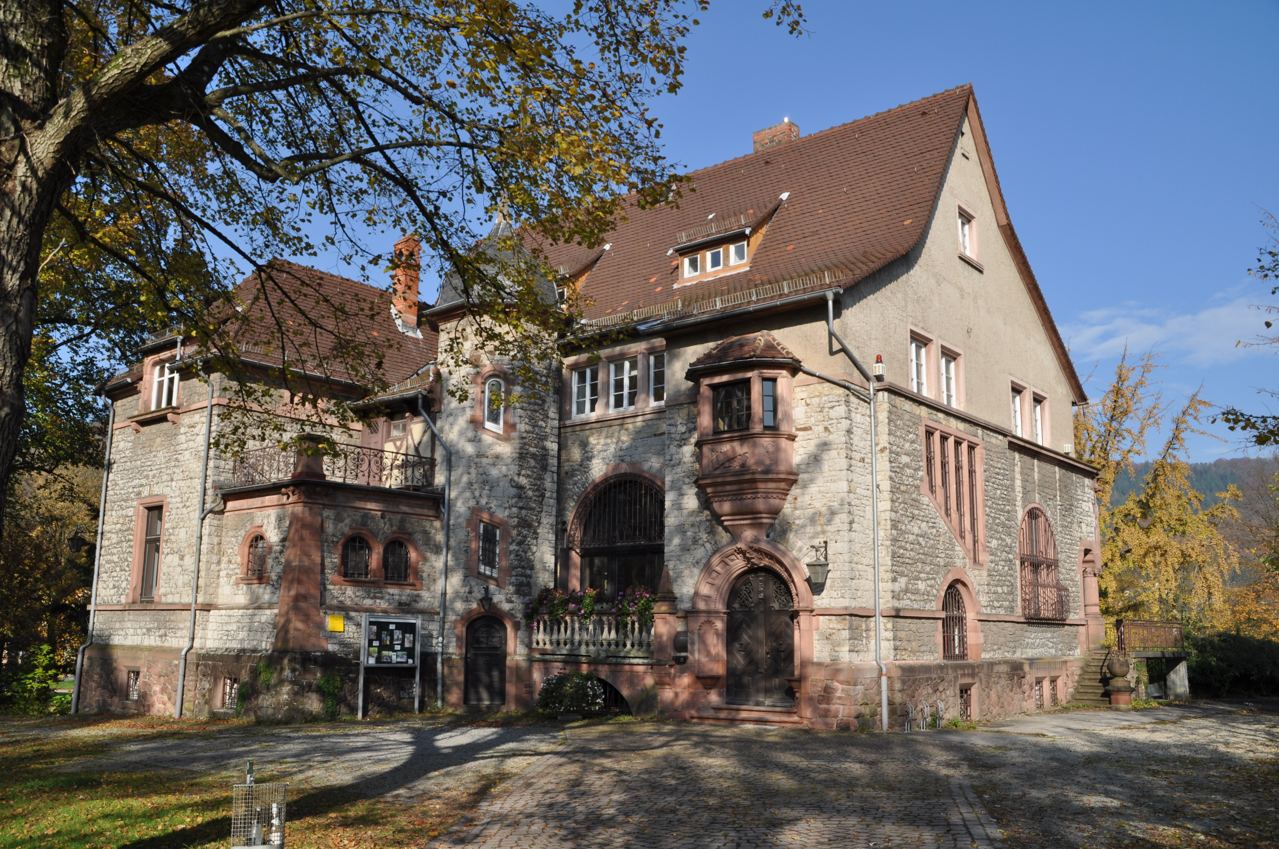 Villa Menzer (1892) - Wohnhaus des Weinhändlers Julius Menzer erbaut von dem Architekten Leonard Schäfer